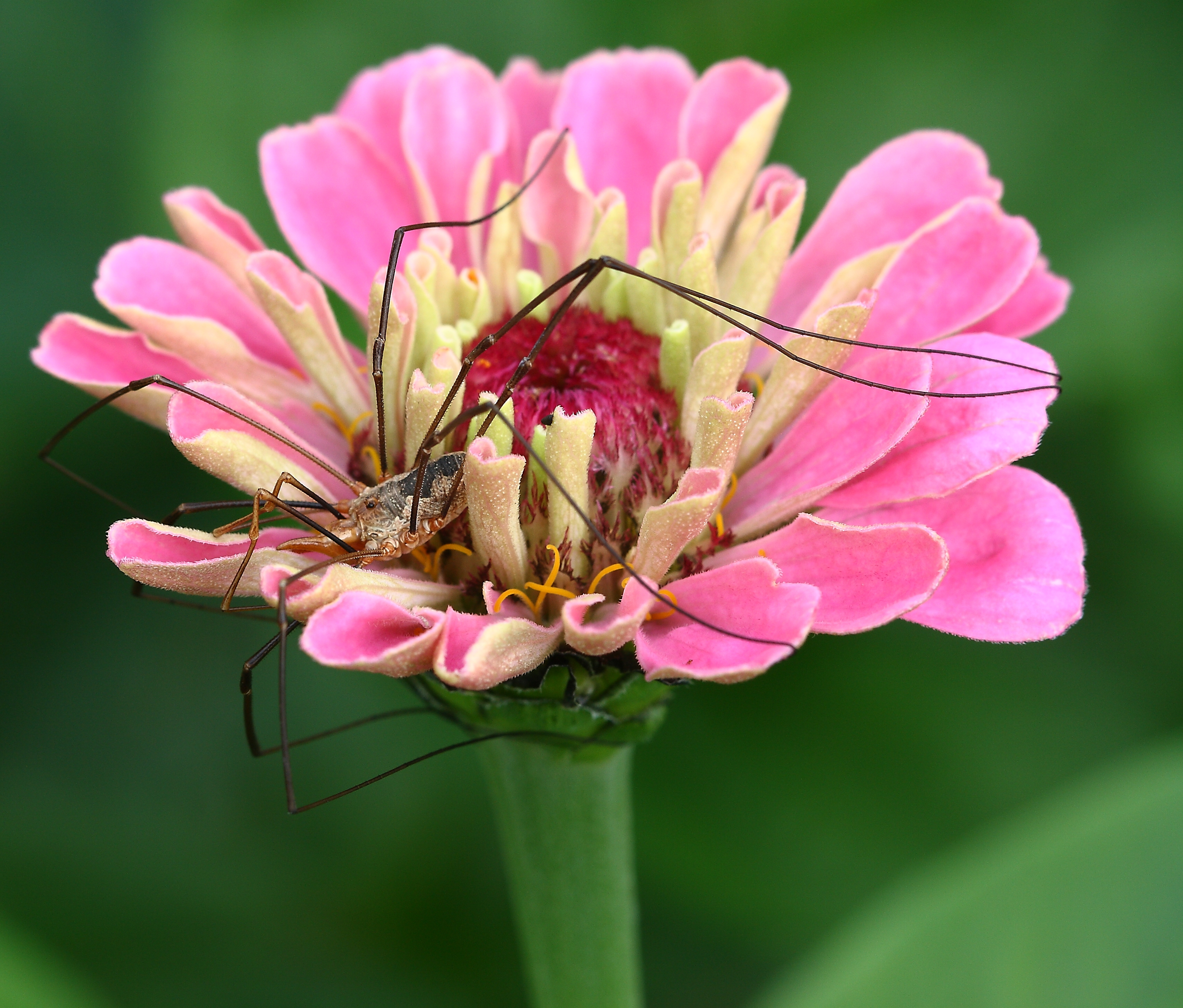 Weberknecht auf einer Zinnie